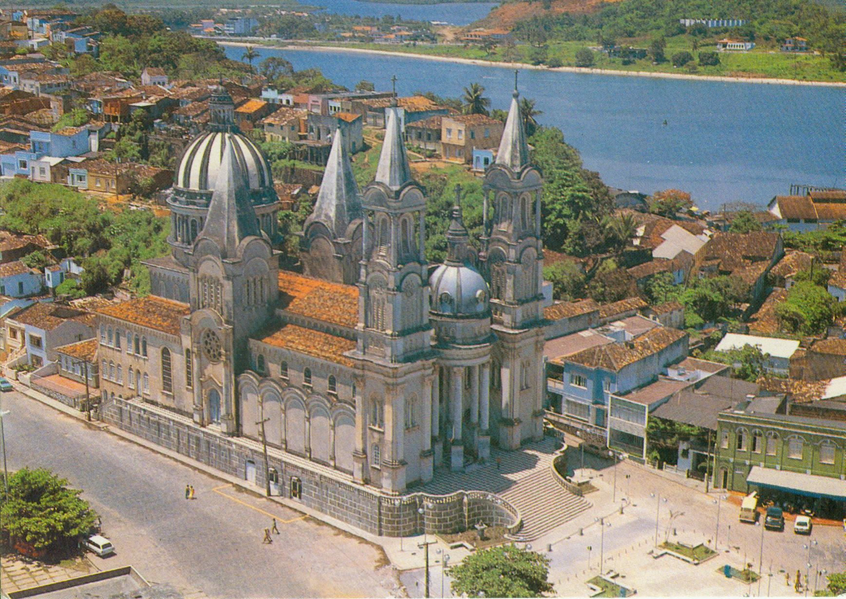 Catedral de São Sebastião e arredores, Ilhéus, Bahia Brasil